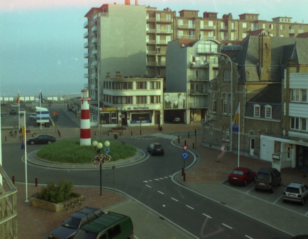 Nieuwpoort-Bad (Belgium), view to "Hendrika Plein"